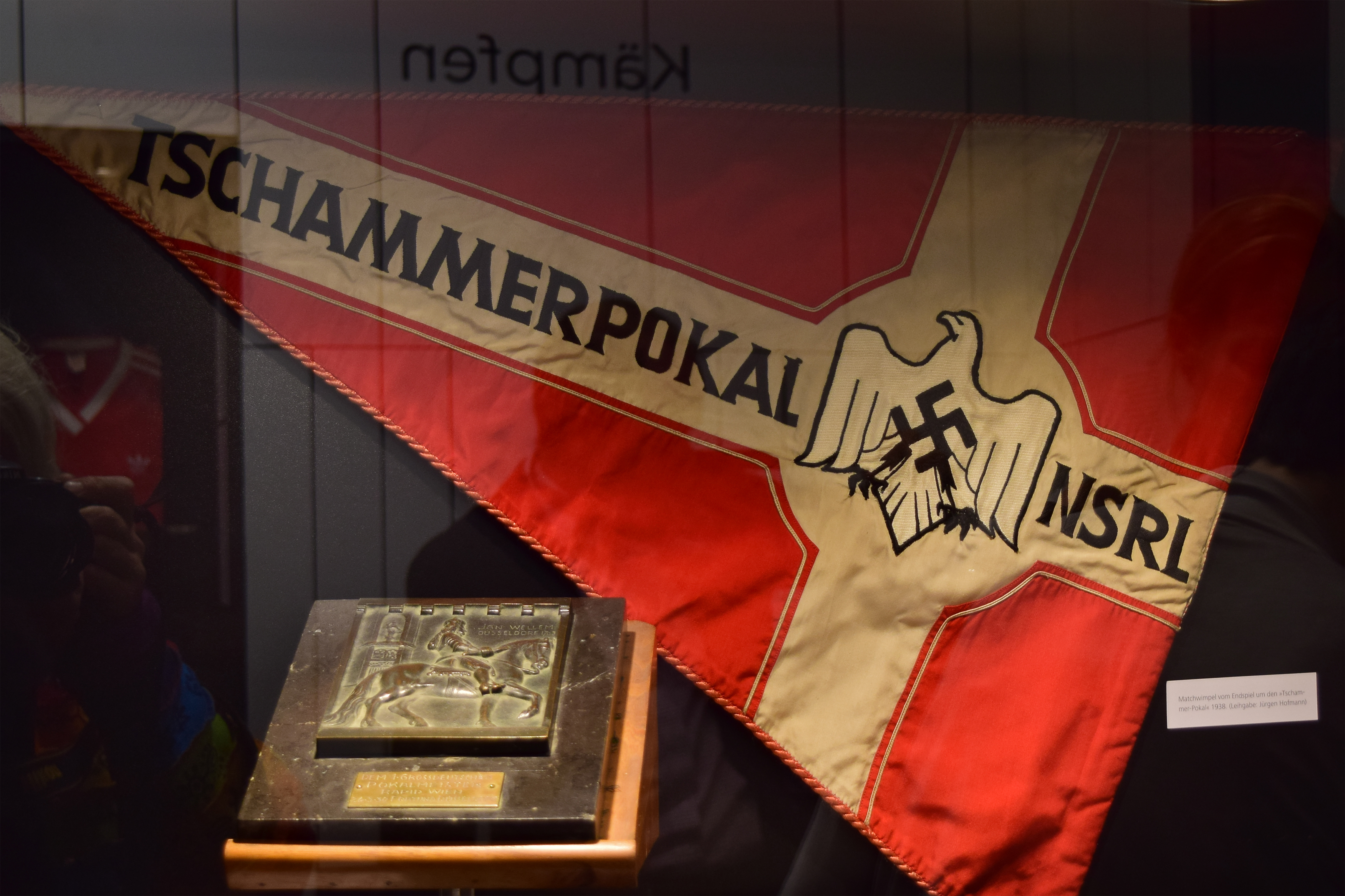 Wimpel des Tschammerpokals 1938 im neuen Rapideum im Allianz-Stadion